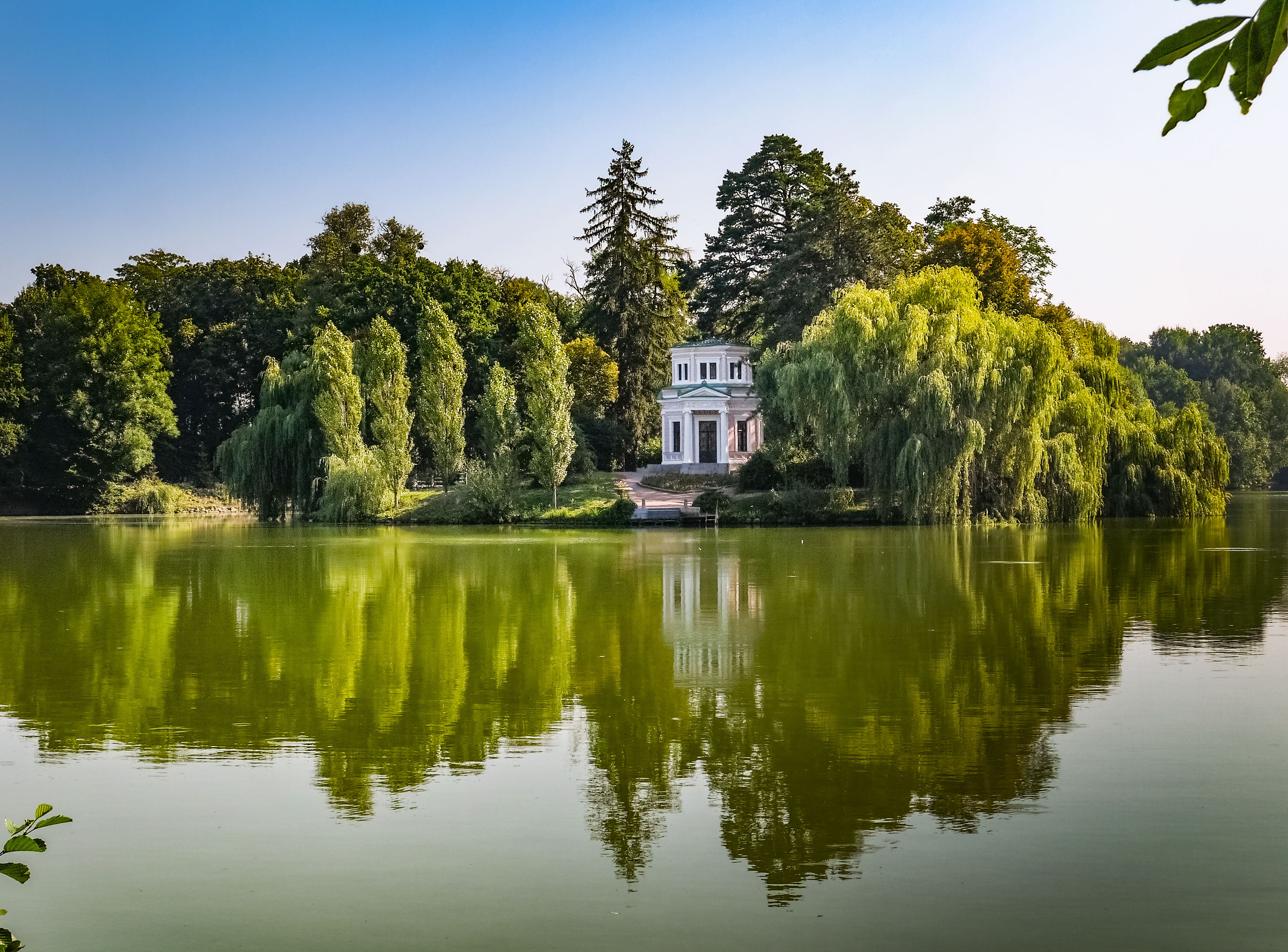 6.2. Острів Анти-Цирцеї (Острів Кохання, Острів Цирцеї), Умань, вул. Садова, 55 (парк «Софіївка»)